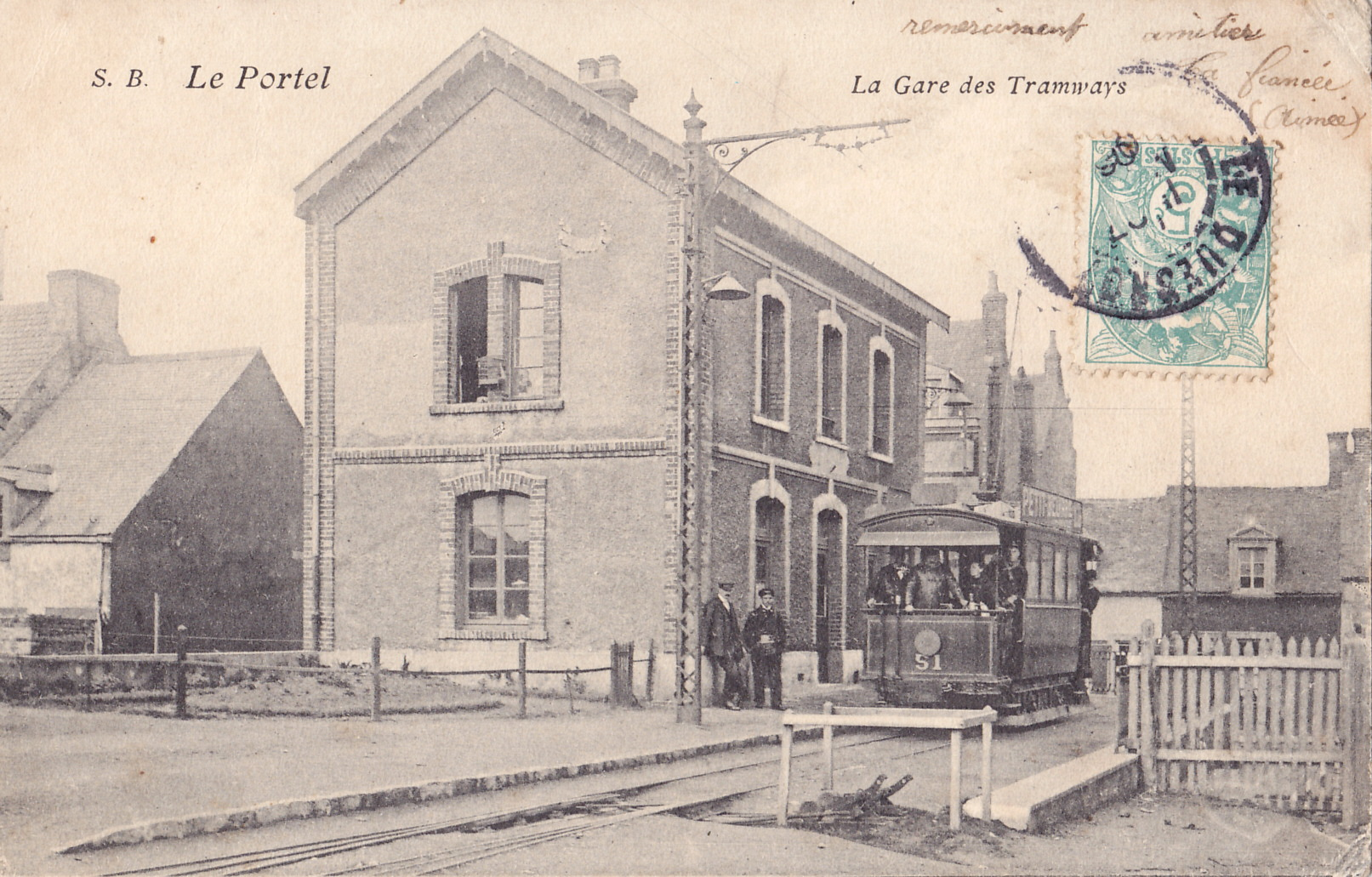 Carte postale ancienne éditée par SB : LE PORTEL - La gare des Tramways